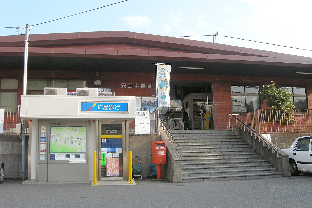 安芸中野駅 Akinakano station